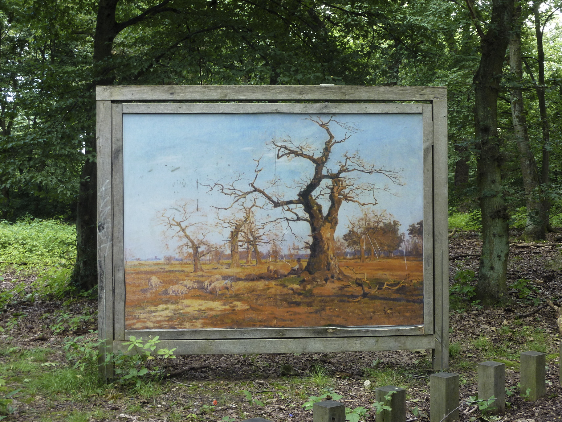 Als Schwanheimer Alteichen wird eine Anzahl von etwa 30 mehrere hundert Jahre alten Stieleichen (Quercus robur) im Südwesten des Stadtgebiets von Frankfurt am Main bezeichnet. Die besonders kräftig gewachsenen Eichen stehen im Frankfurter Stadtwald auf der Gemarkung des südmainischen Stadtteils Frankfurt-Schwanheim. Das Foto zeigt die dauerhaft vor Ort ausgestellte großformatige Reproduktion eines Gemäldes des Landschaftsmalers Fritz Wucherer (1873–1948), Bei den Schwanheimer Eichen (1899)